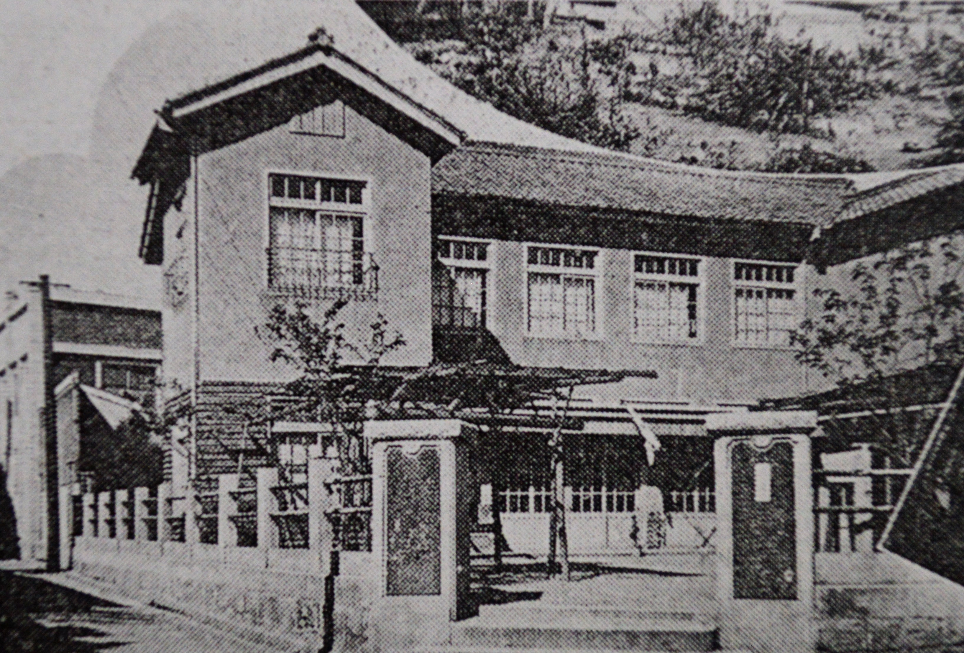 1931年に新築された多治見幼稚園の写真。『昭和9年合併記念帖』所収。